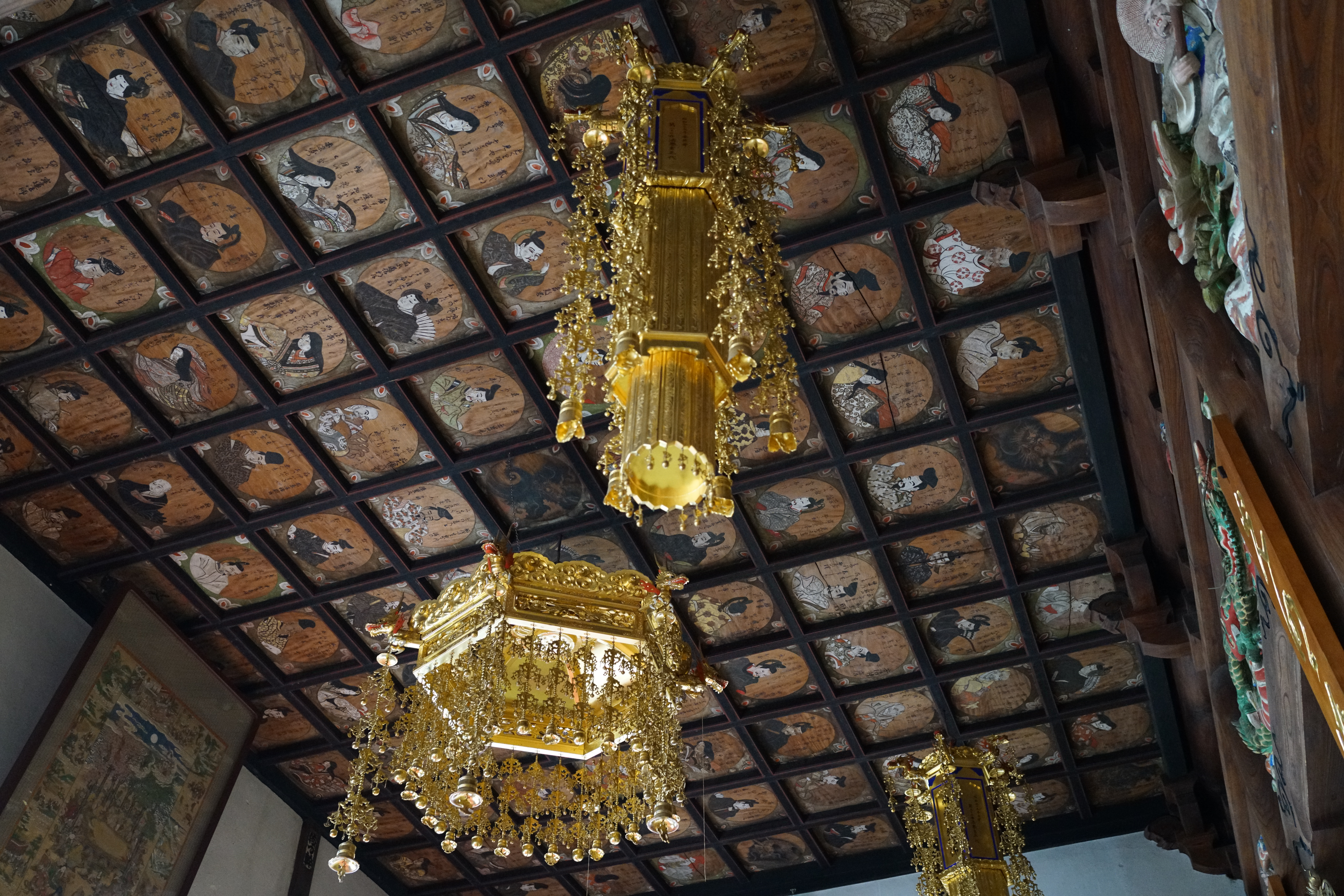 42万画素 高詳細画像